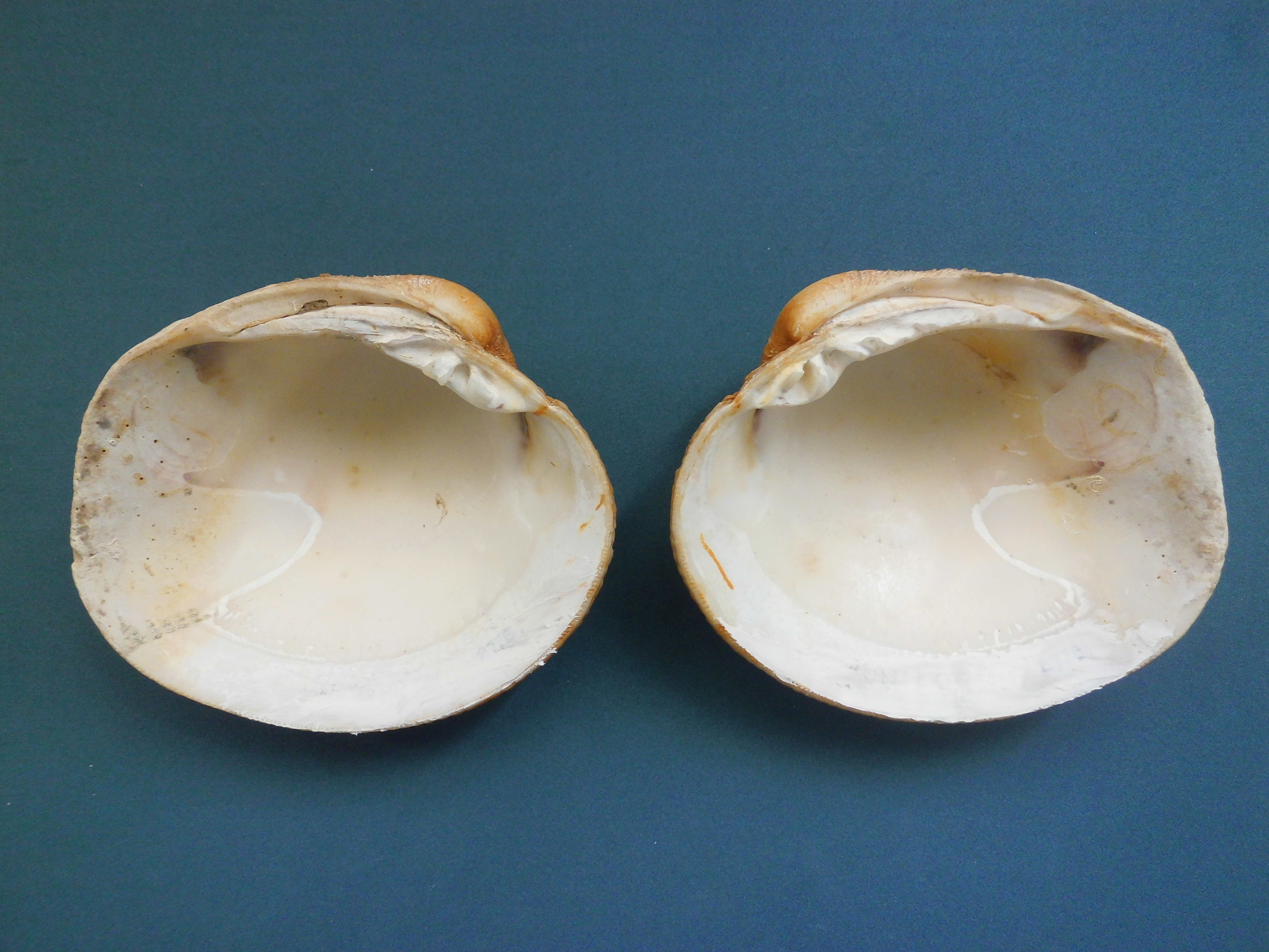 Antigona listeri (J. E. Gray, 1838) colectado en 2002 en cayo Bubi Archipiélago Las Aves, Dependencias Federales - Venezuela